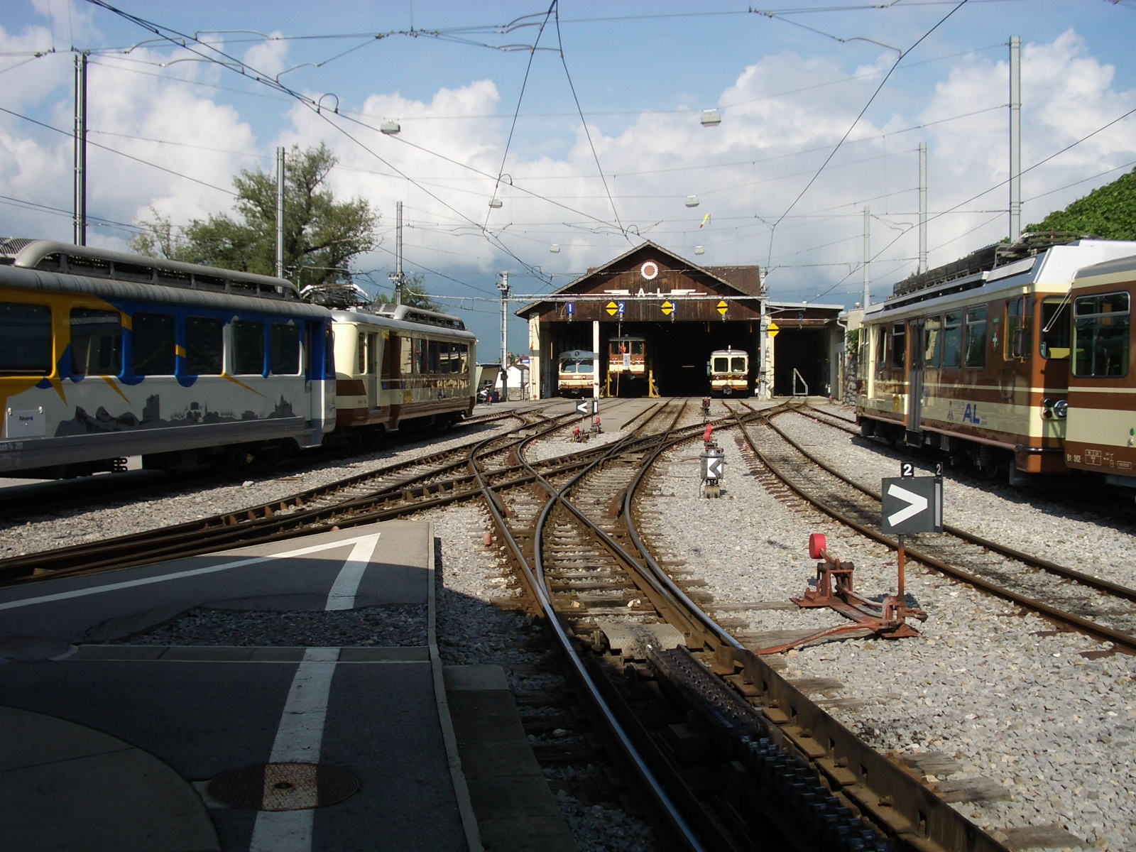 Aigle VD, Switzerland self-made, August 2006